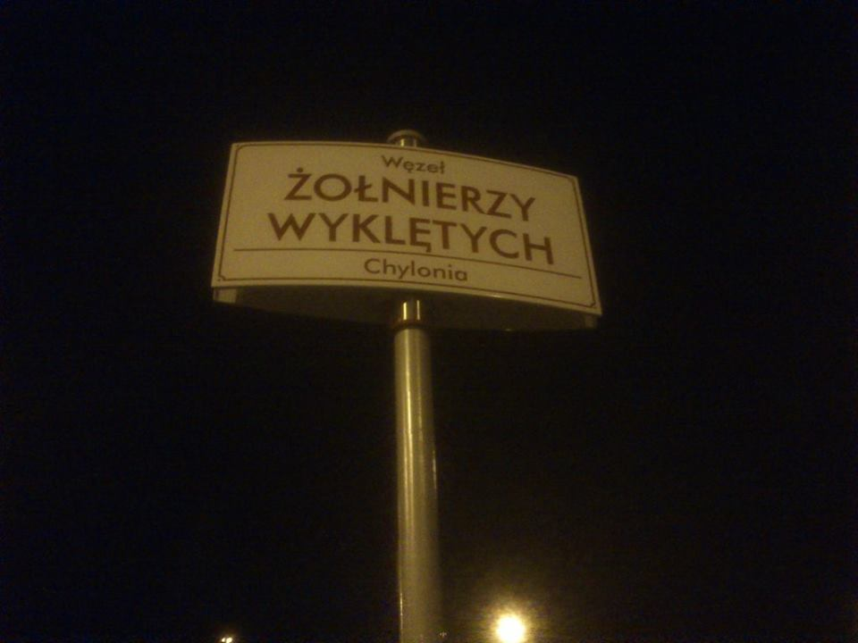 Rondo im. Żołnierzy Wyklętych w Gdyni Chyloni